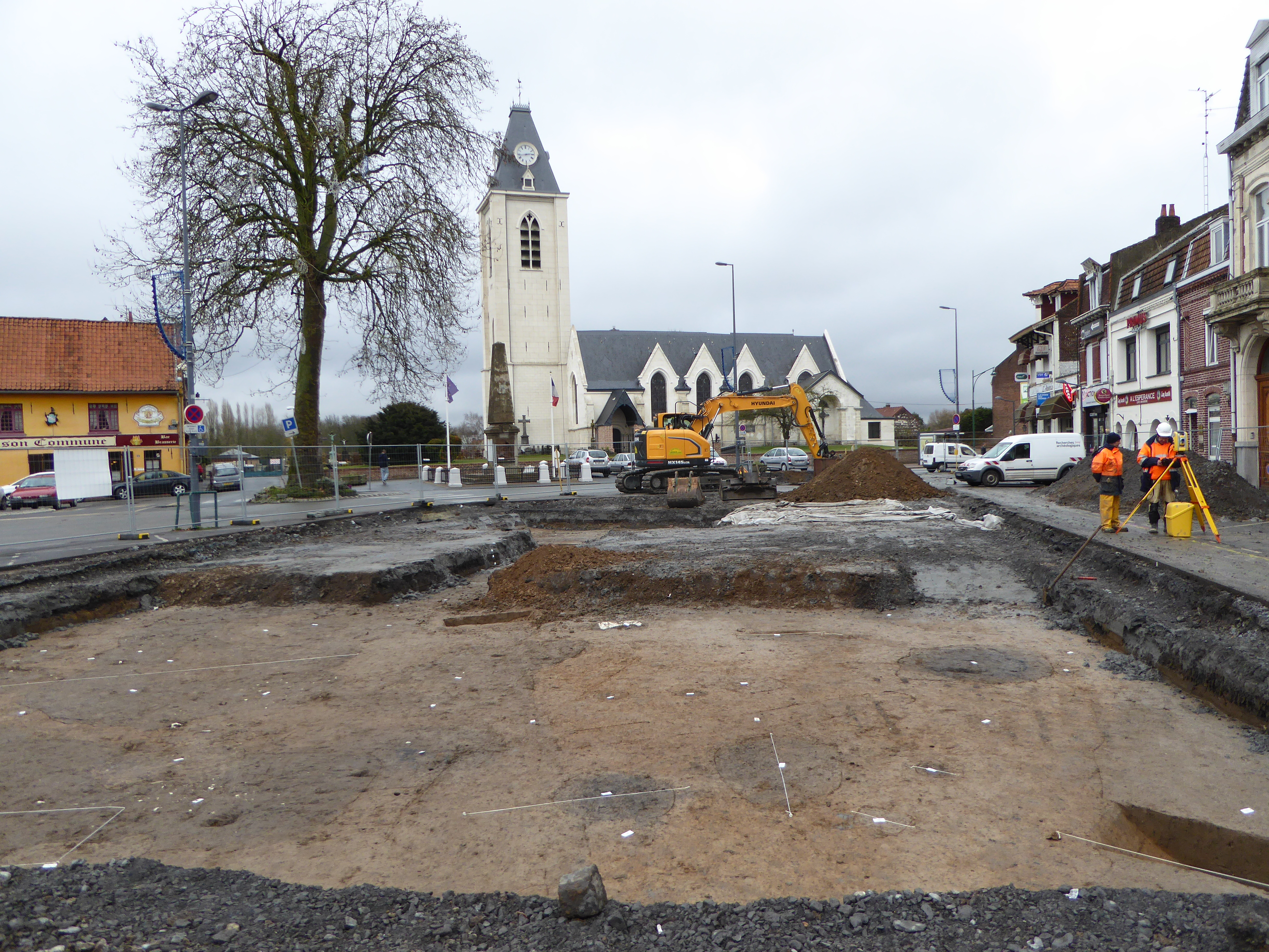 Fouilles préventives de l'INRAP, Place de la République dans l'ancien village d'Annappes Villeneuve-d'Ascq,France